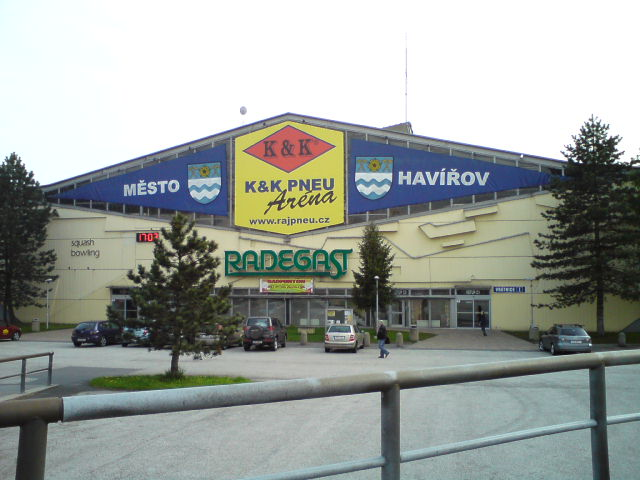 K&K PNEU Aréna